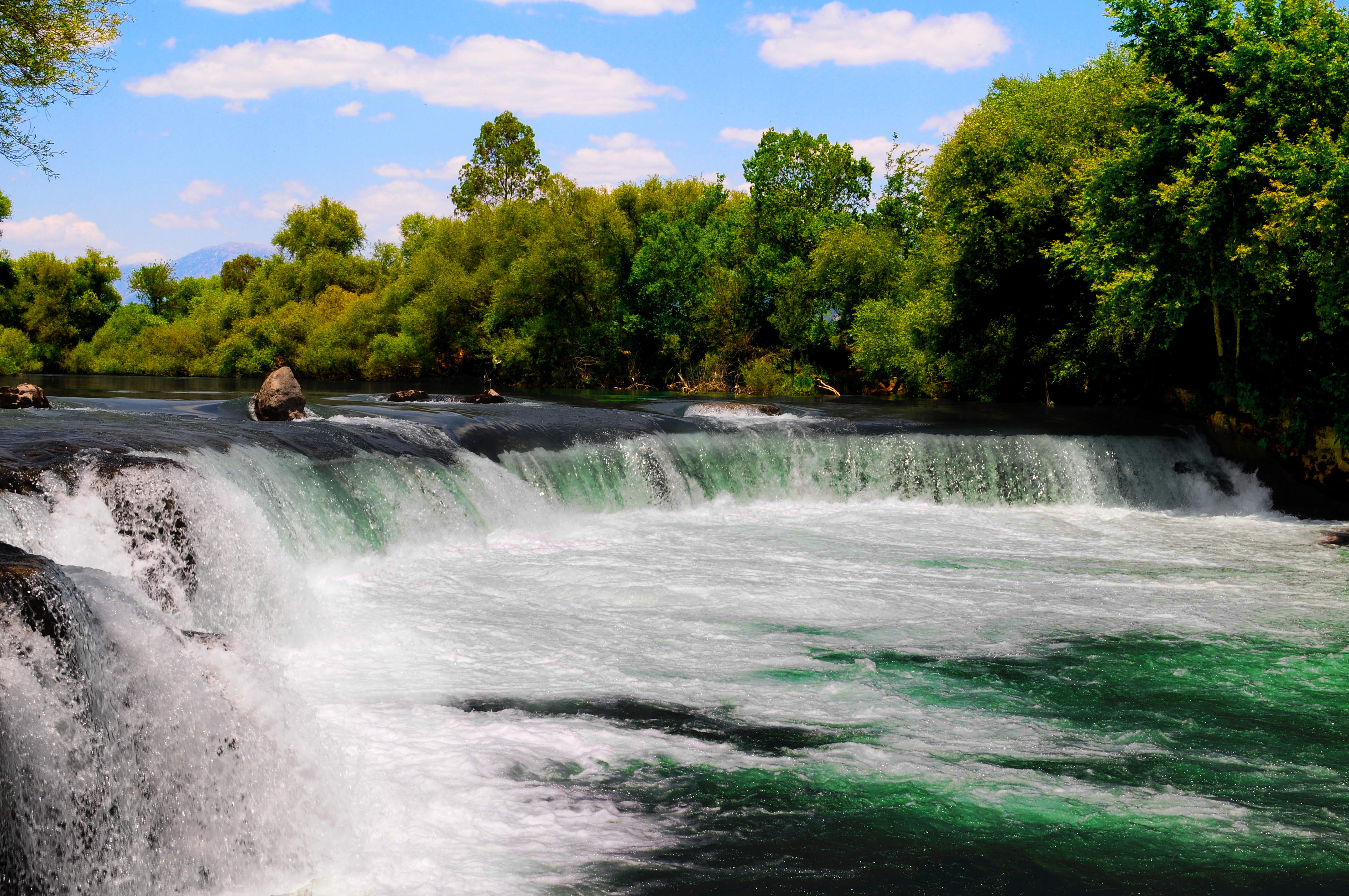 Manavgat Waterfall in Turkey